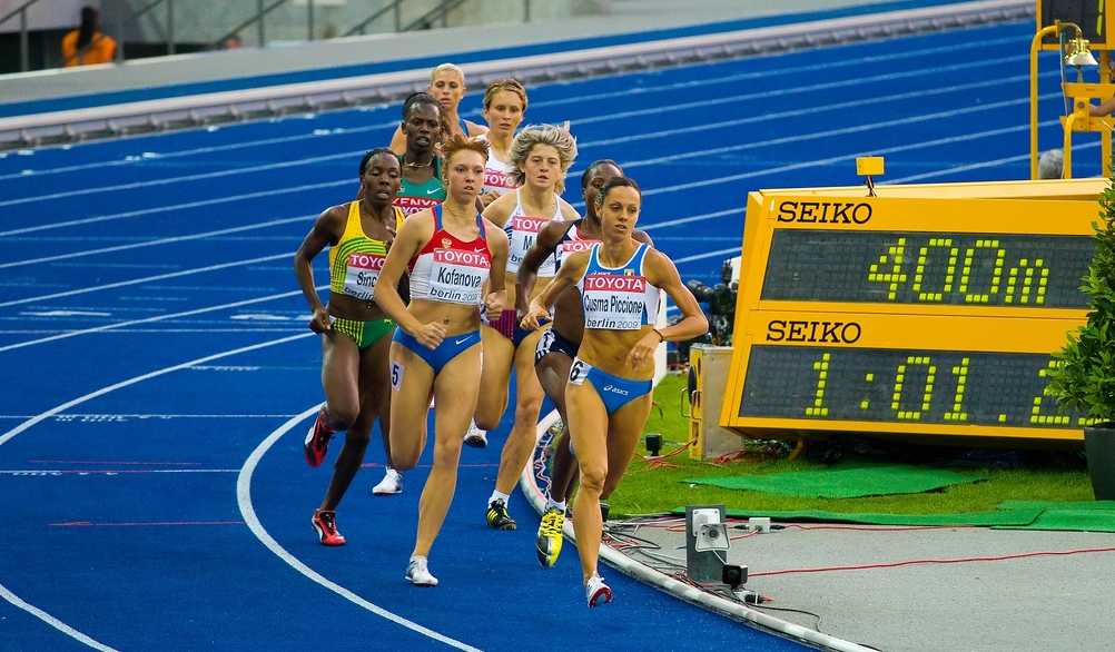 800m Semifinale der Frauen.